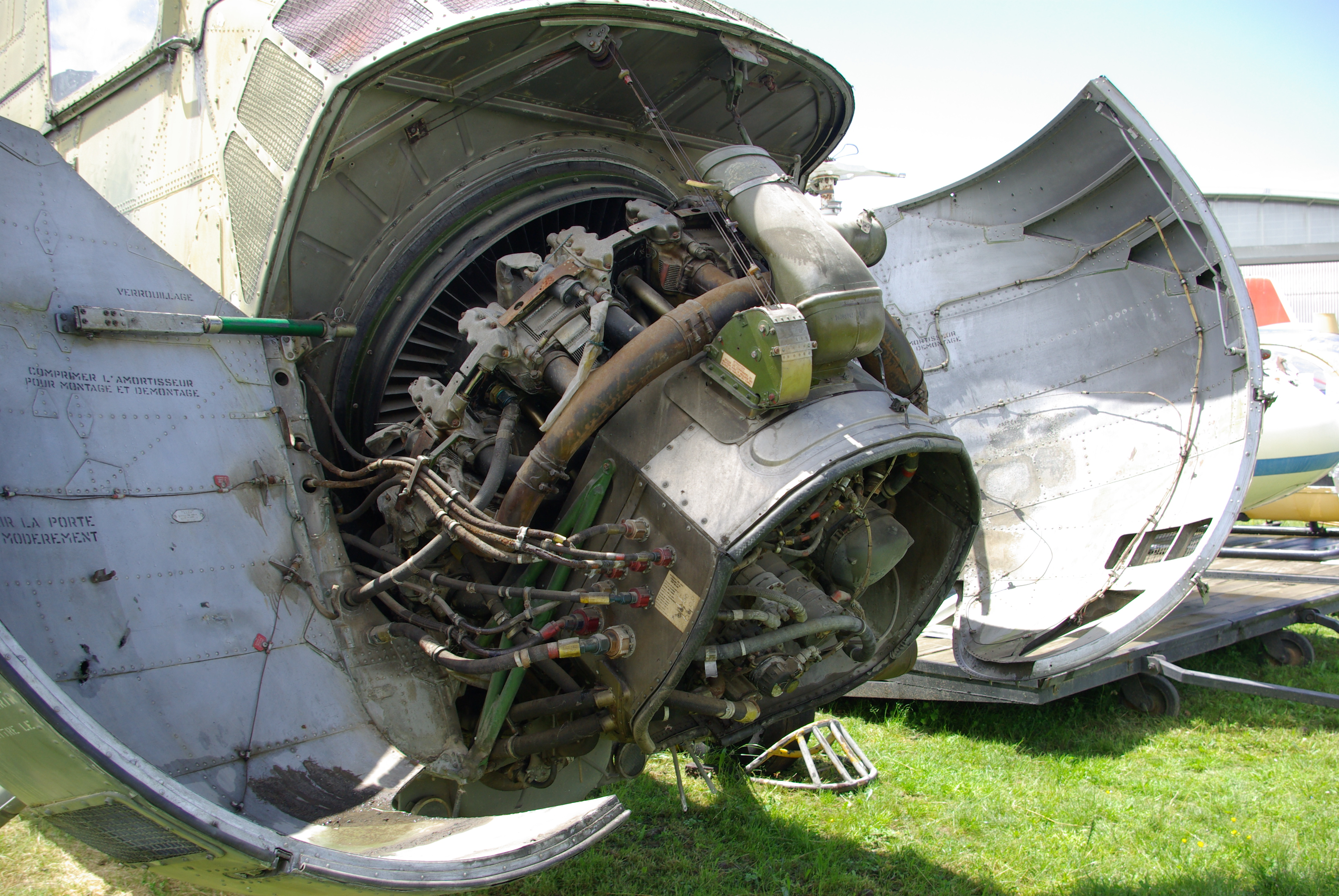 Moteur du Sikorsky H-34 logé dans le nez de l'appareil.